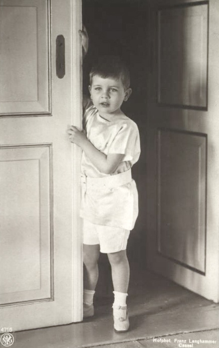 Príncipe Luís Ernesto de Hesse (1931-1937)